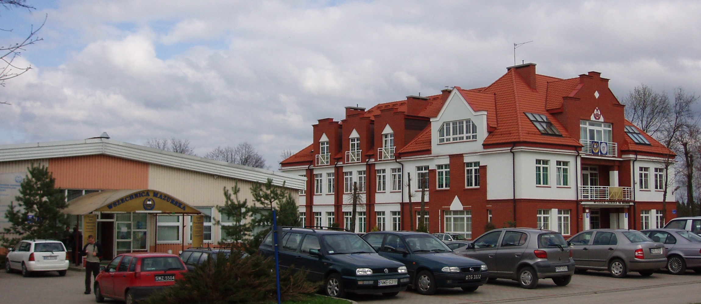 Budynki Wszechnicy Mazurskiej w Olecku, od frontu